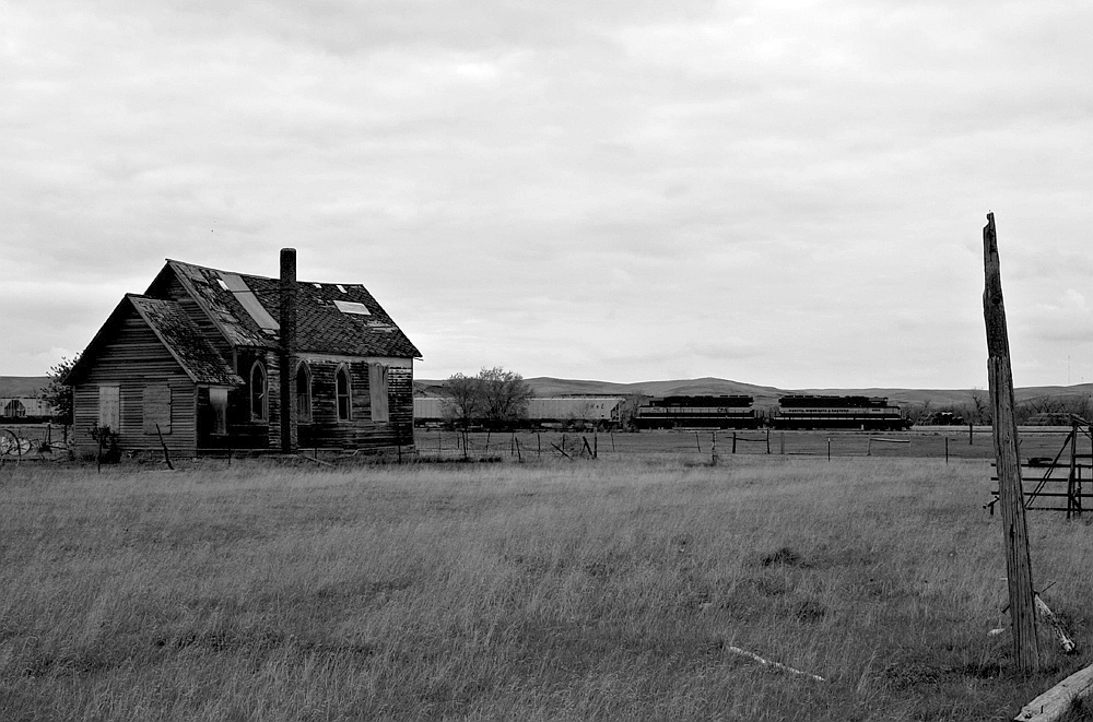 Capa, South Dakota.